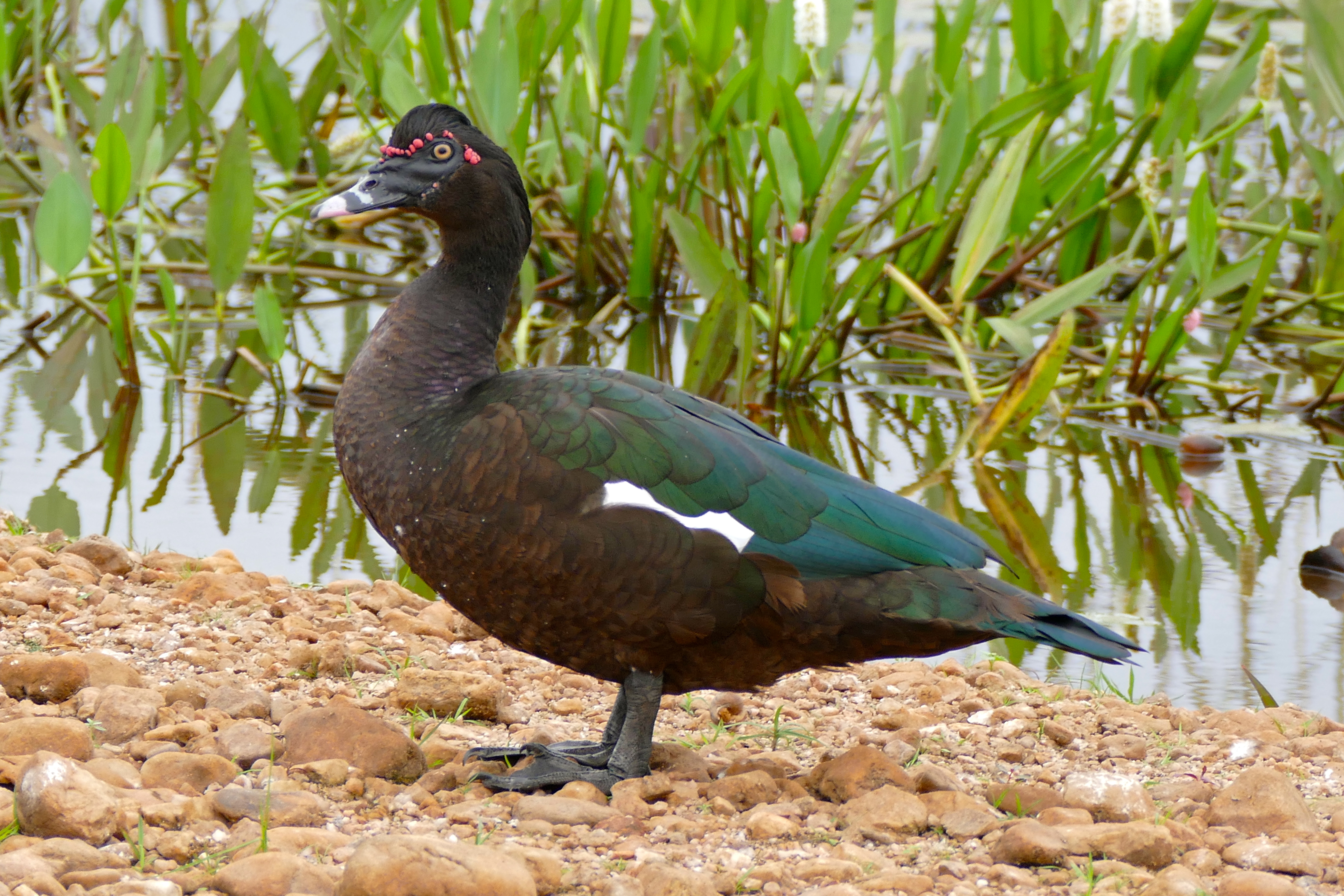 Transpantaneira, Poconé, Mato Grosso, BRAZIL